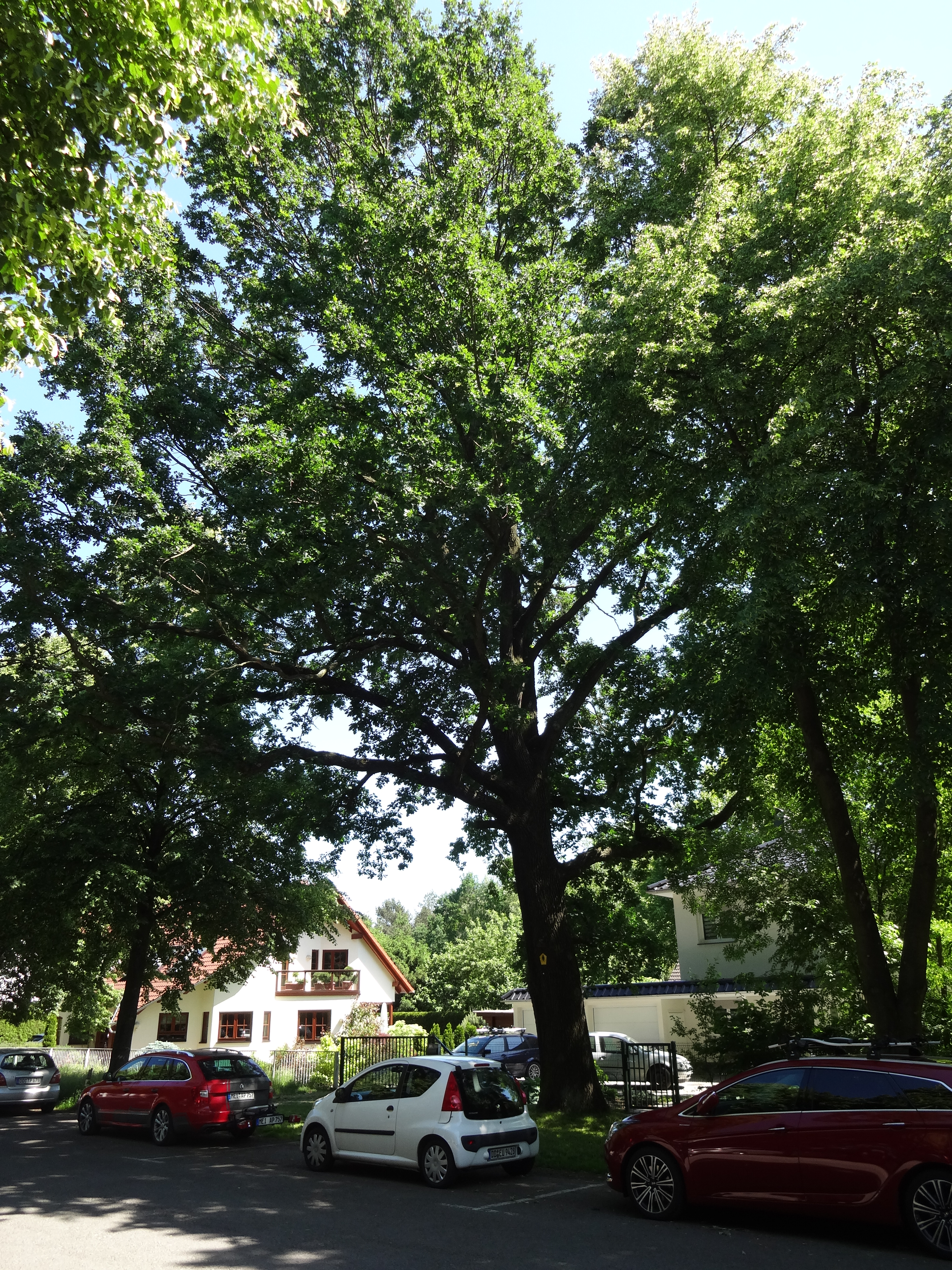 Naturdenkmal 0106-3 Stieleiche (Quercus robur) in Niemtsch in der Seestraße neben Grundstück Nr. 22